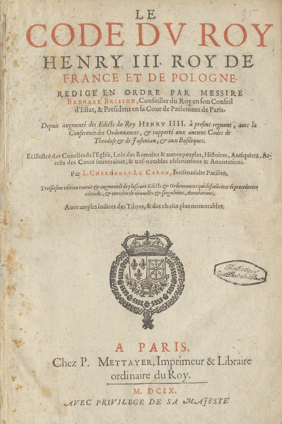 Le Code du Roy Henry III, Roy de France et de Pologne rédigé en ordre par messire Barnabé Brisson